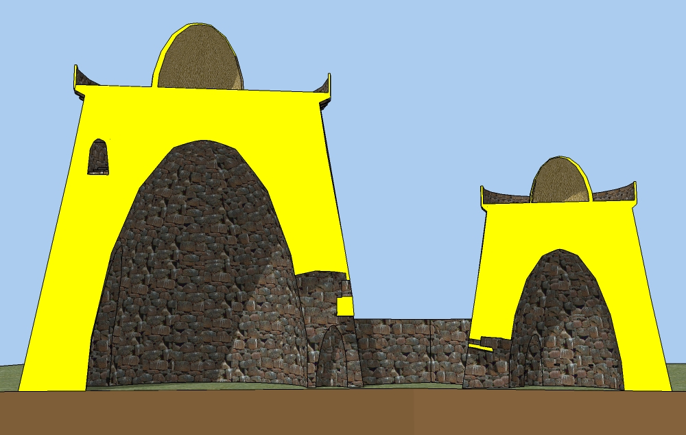 Nuraghe S. Barbara - Villanova Truschedu (Oristano) Restituzione architettonica - modello sketchup 3D